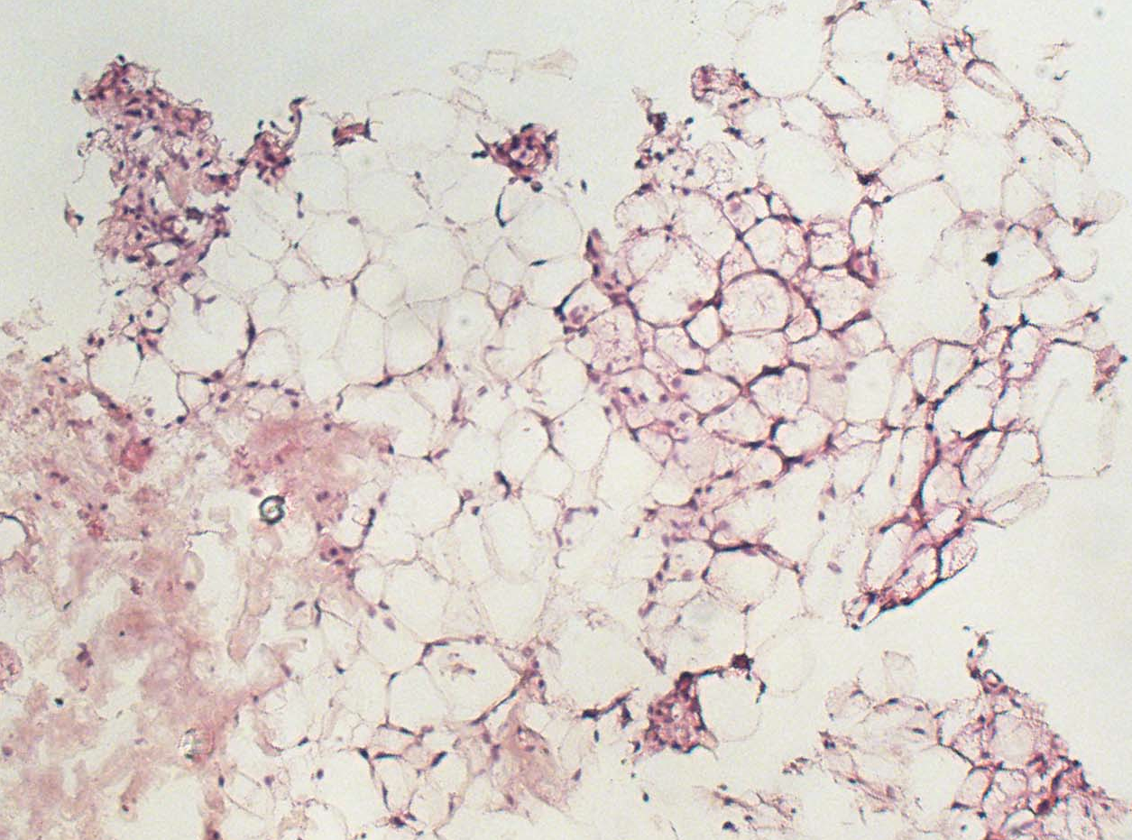 Bruin vet is vaak vermengd met wit vet. Rechtsboven zijn typische bruin vetcellen te zien, met meerdere vetdruppels per cel. Links zijn witte vetcellen te zien, met een grote vetdruppel per cel.